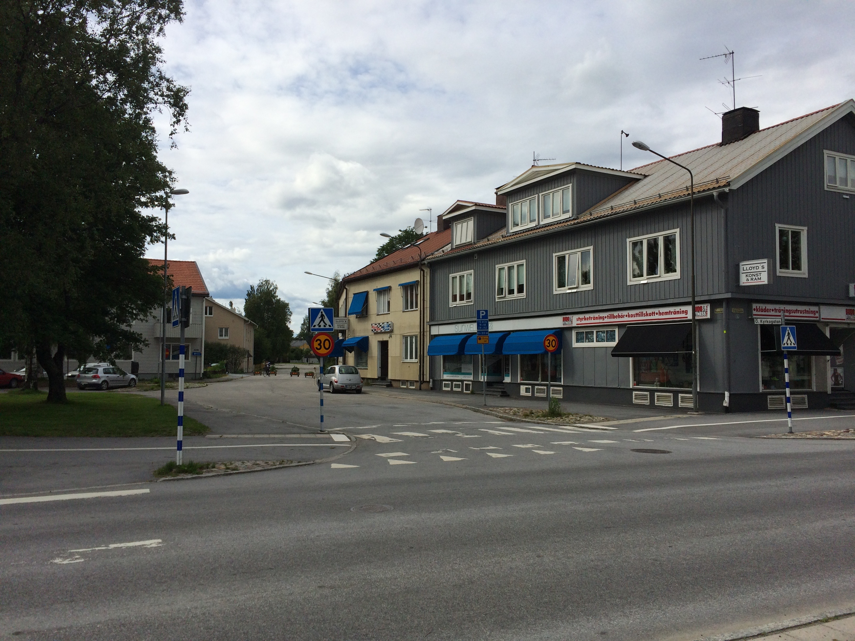 Hagaplan är ett "torg" mellan Plangatan och Östra kyrkogatan i Umeå.